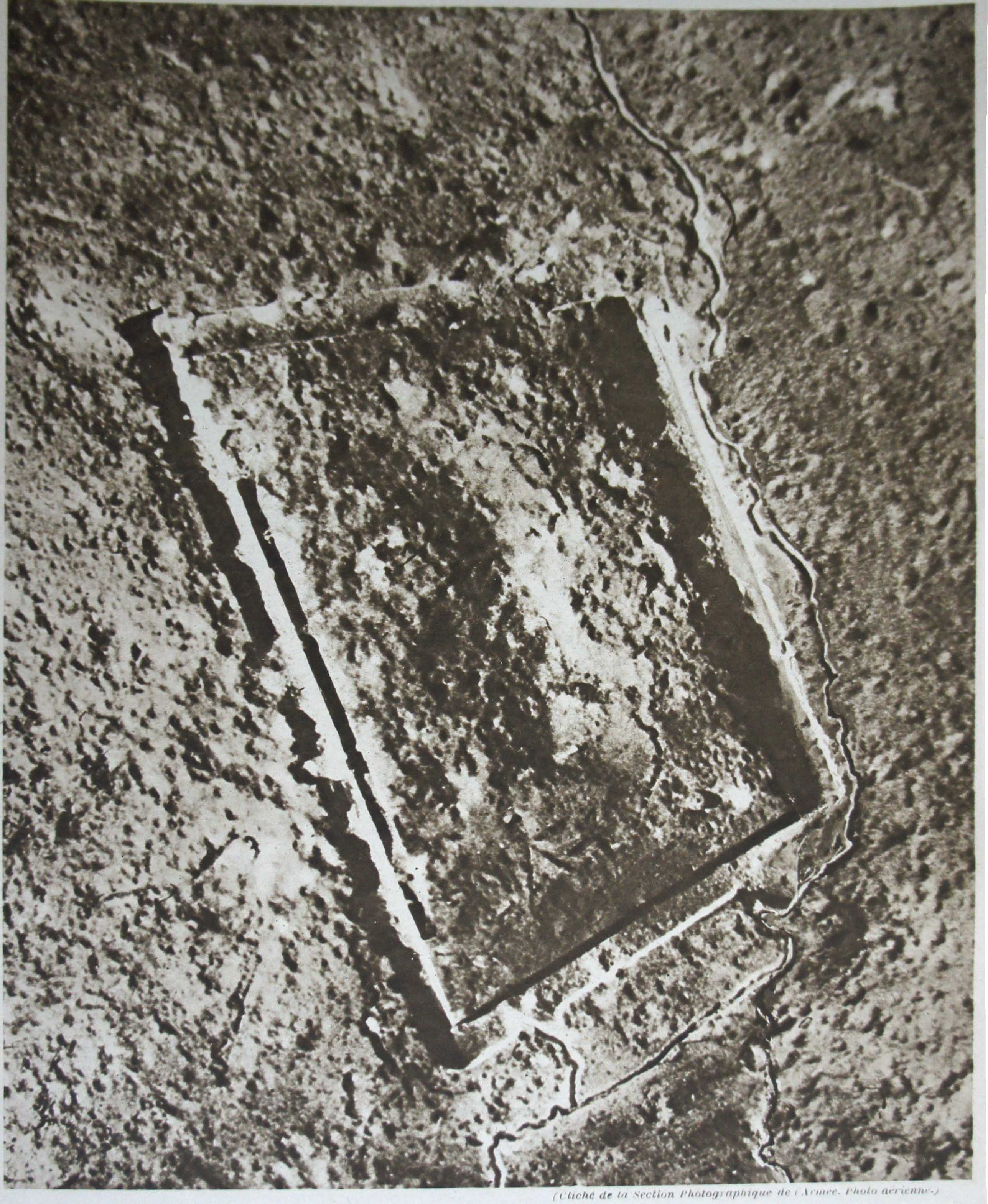 Le Miroir N°156, page_5, le_fort_de_Vaux_avant_que_les français ne le reprennent.